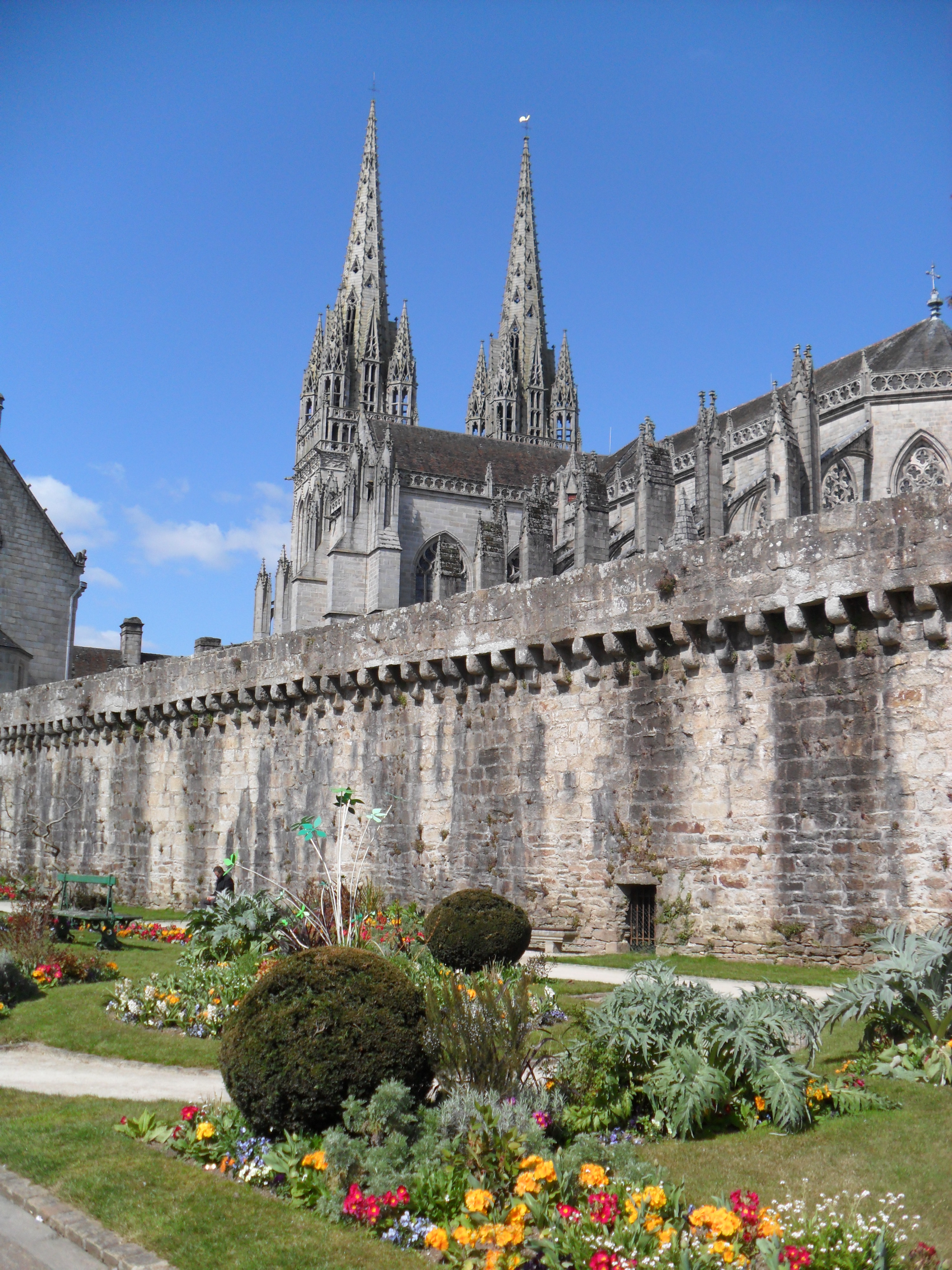 Vue sur la Cathédrale Saint-Corentin de Quimper (France) - 2013